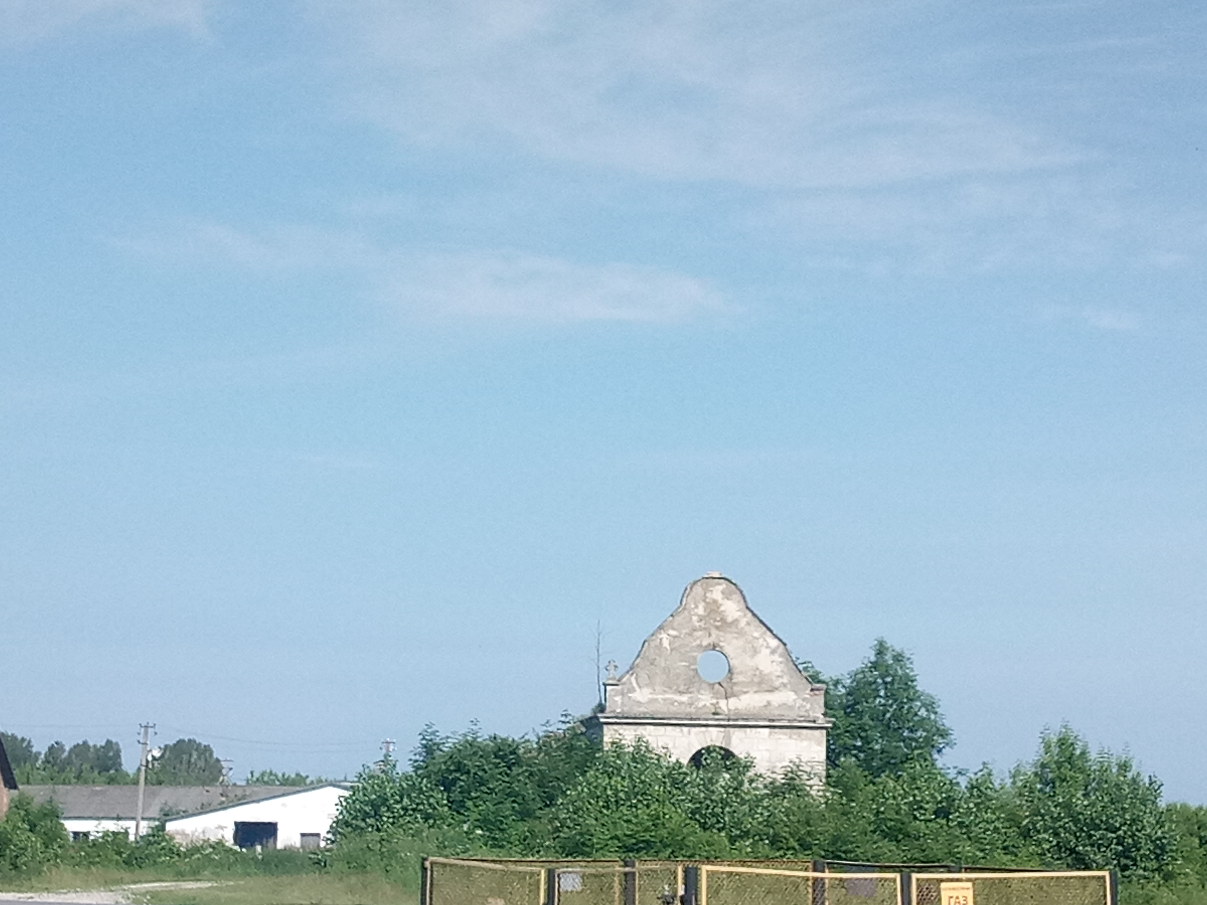 фото руїн костелу